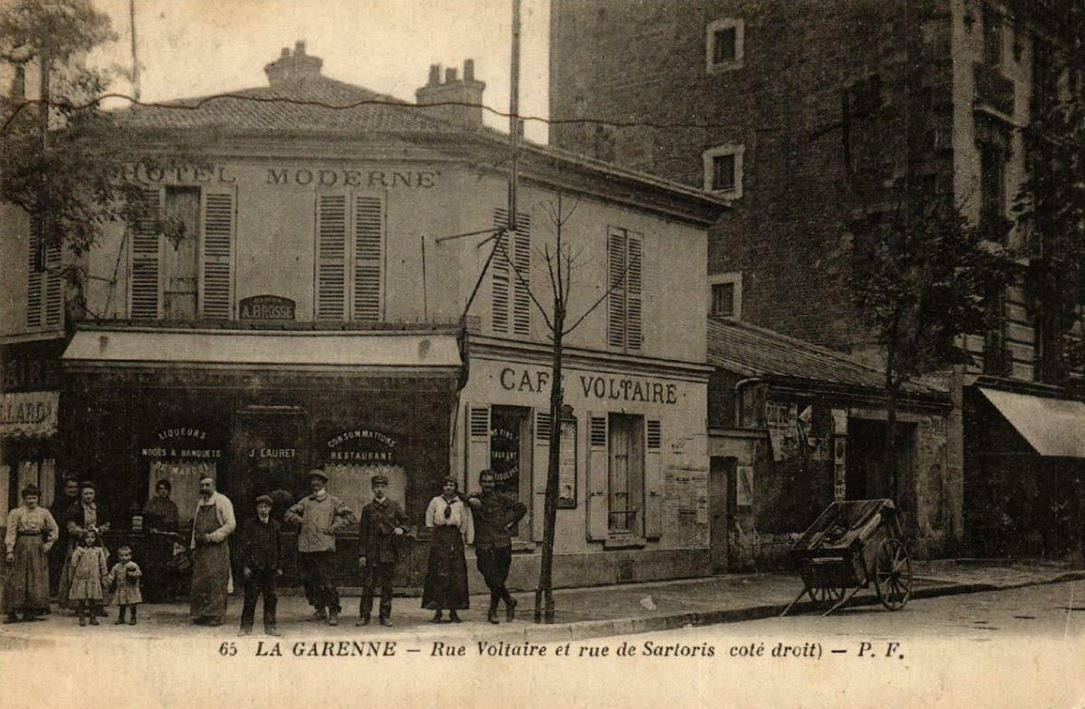 La Garenne-Colombes.Rue Voltaire.Rue de Sartoris.Hôtel Moderne